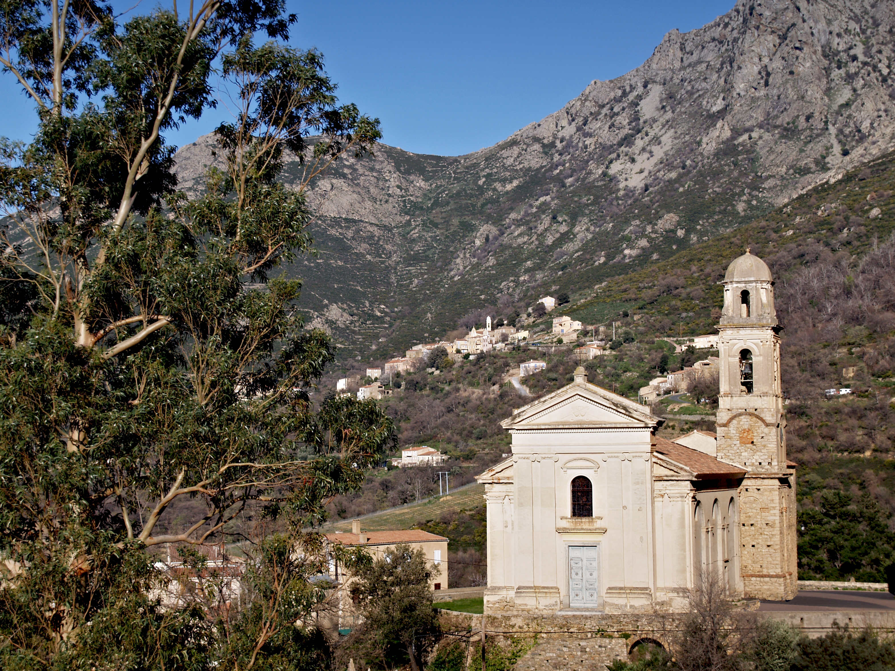 Feliceto, Balagne (Corse) - Église Saint-Nicolas. En fond le village de Nessa avec le clocher de l'église St-Joseph